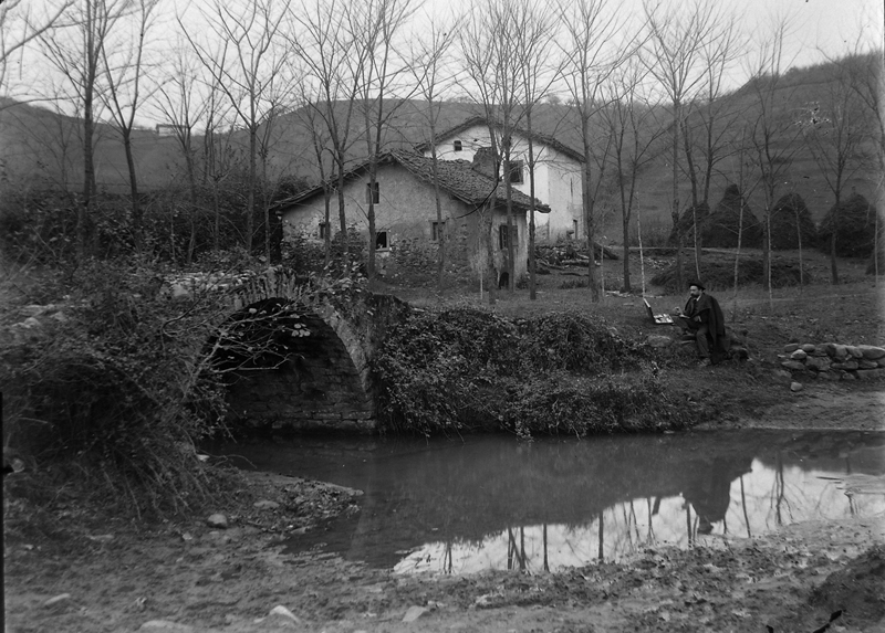 Còpia digital del negatiu original de vidre Llegat Dolors Moros, 2010 Museu d'Art Jaume Morera. 2865